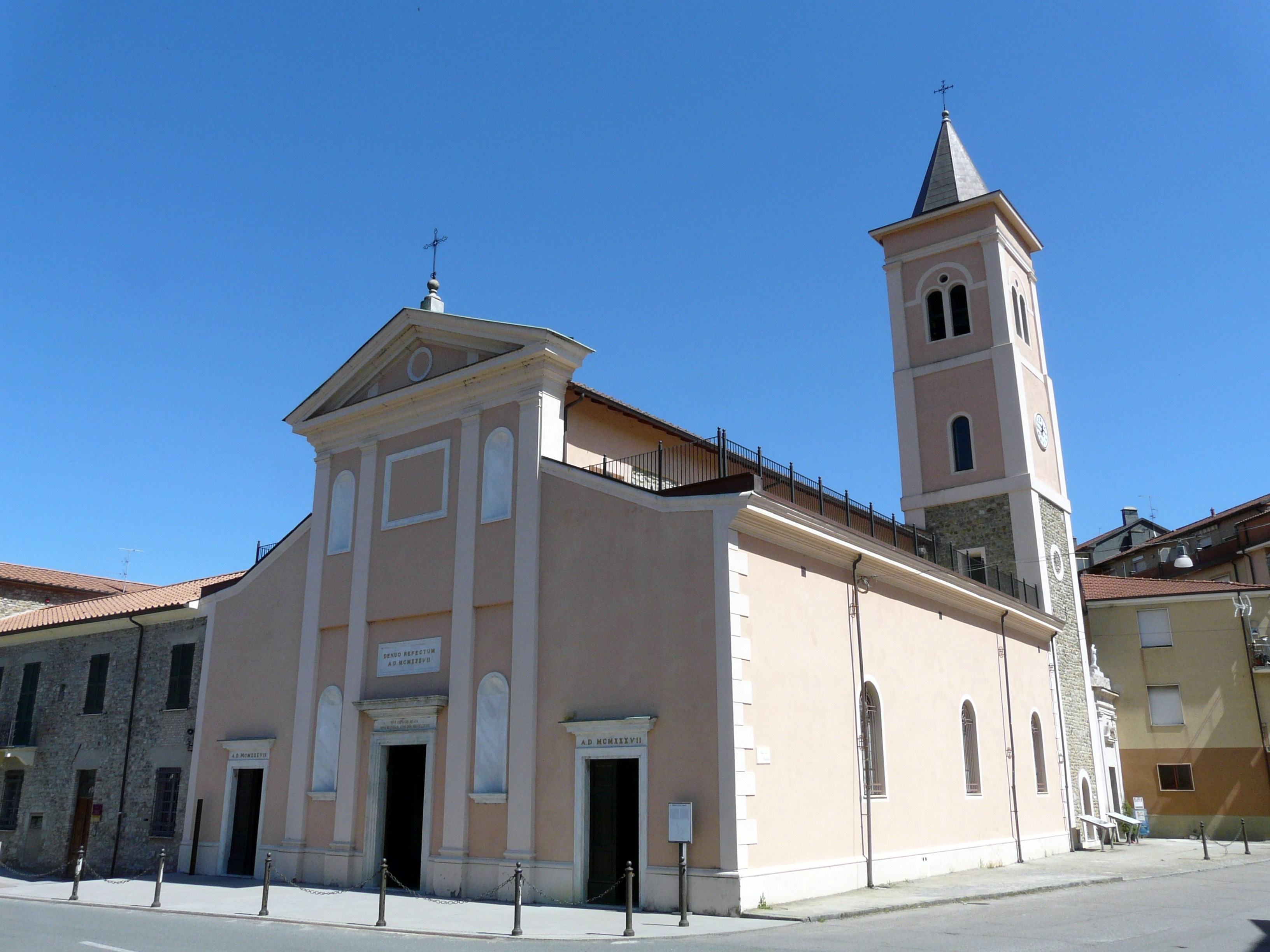 Complesso dell'abbazia di San Caprasio, Aulla, Toscana, Italia